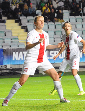 a_57_3922